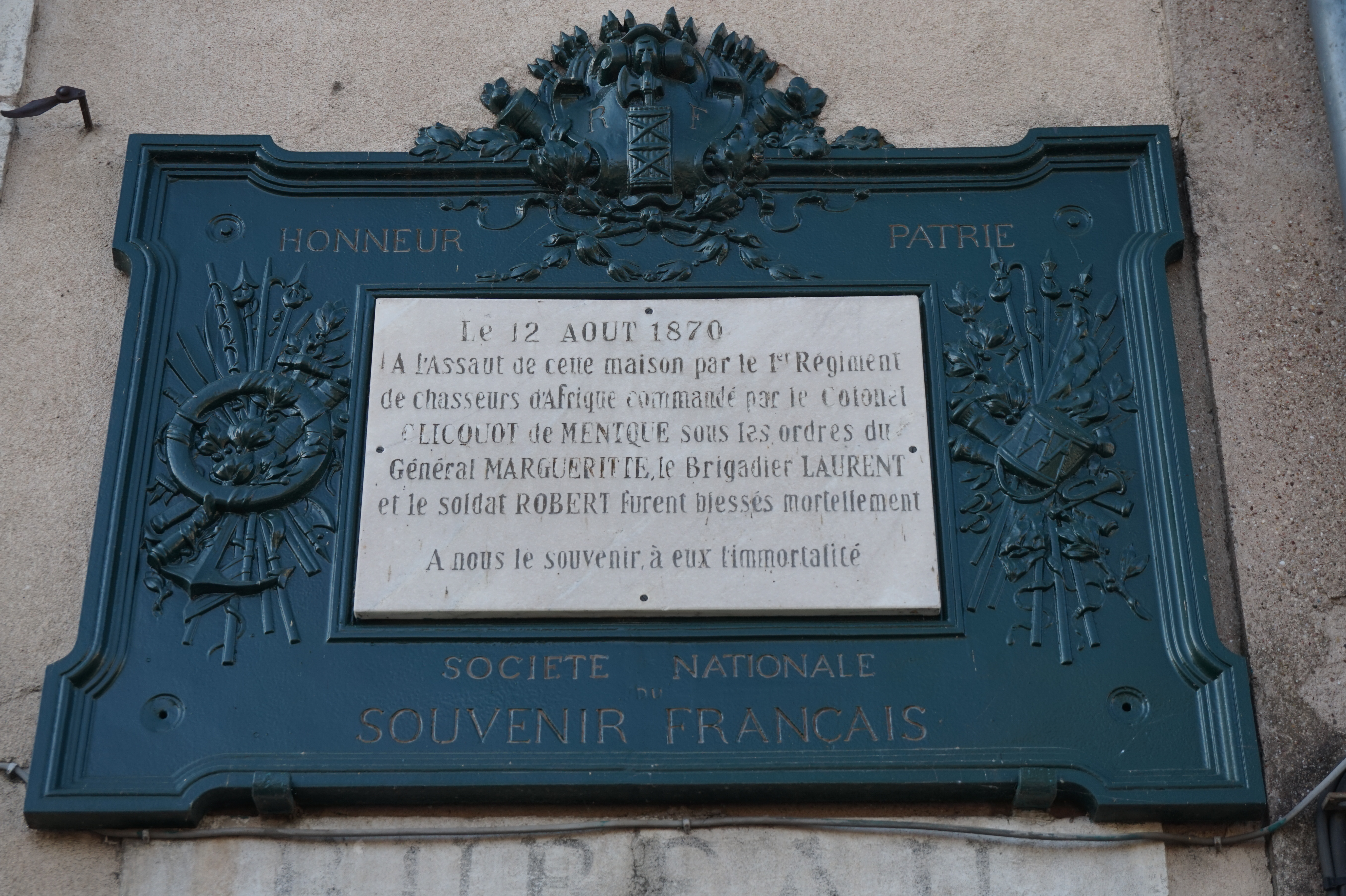 Rue Gambetta à Pont-à-Mousson, plaque du Souvenir français, guerre de 1870 : "Le 12 août 1870, à l'assaut de cette maison par le 1er régiment de chasseurs d'Afrique commandé par le colonel Clicquot de Mentque sous les ordres du général Margueritte, le brigadier Laurent et soldat Robert furent blessés mortellement. À nous le souvenir, à eux l'immortalité. Honneur, patrie, Société nationale du Souvenir français."